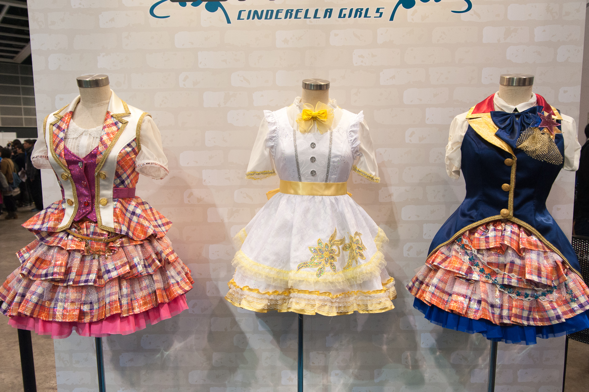 2015年C3日本動玩展覽，《偶像大師系列》攤位展示的《偶像大師 灰姑娘女孩》舞台裝。